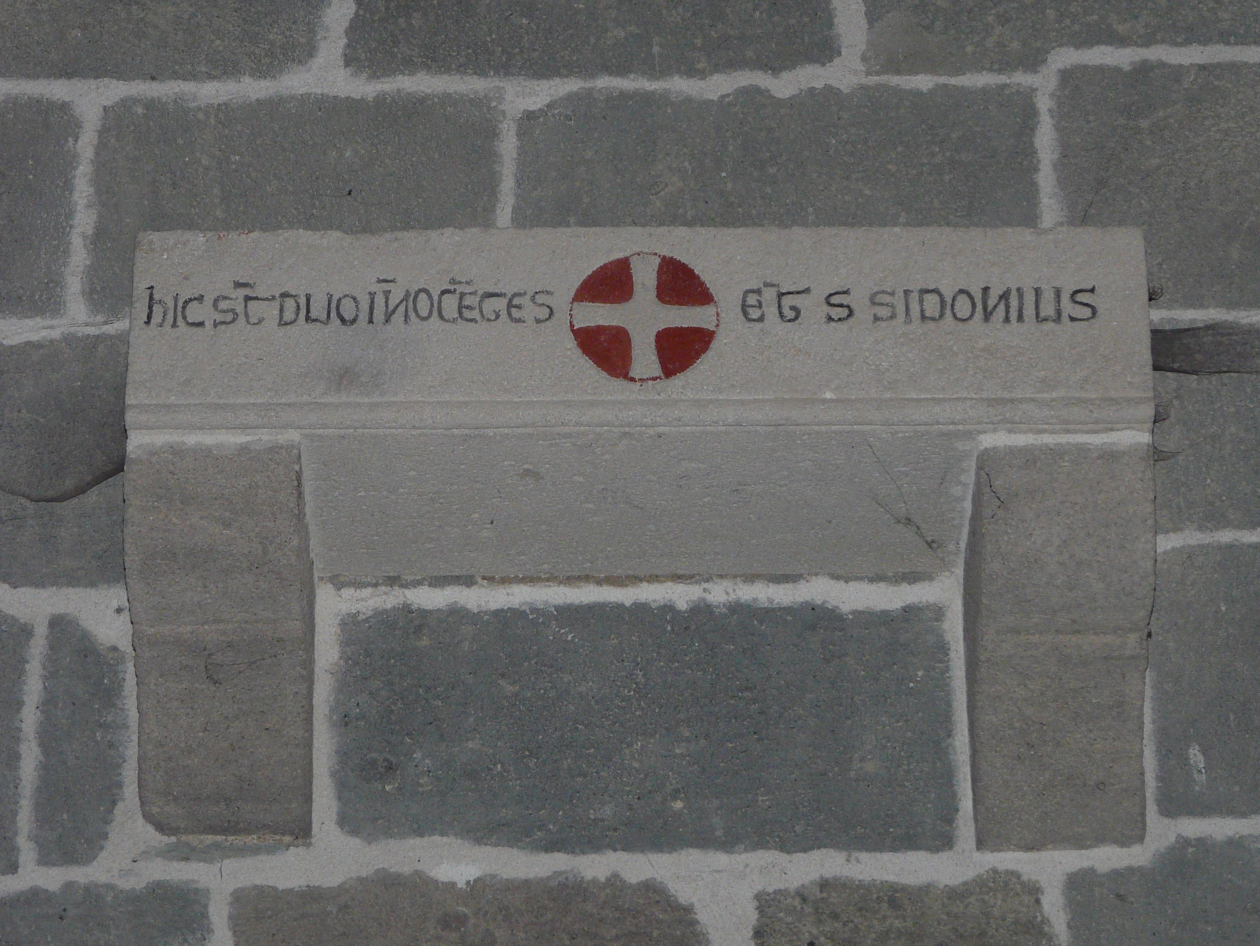 Inscription en latin évoquant Sidoine Apollinaire, église Saint-Sidoine d'Aydat, Puy-de-Dôme, France.